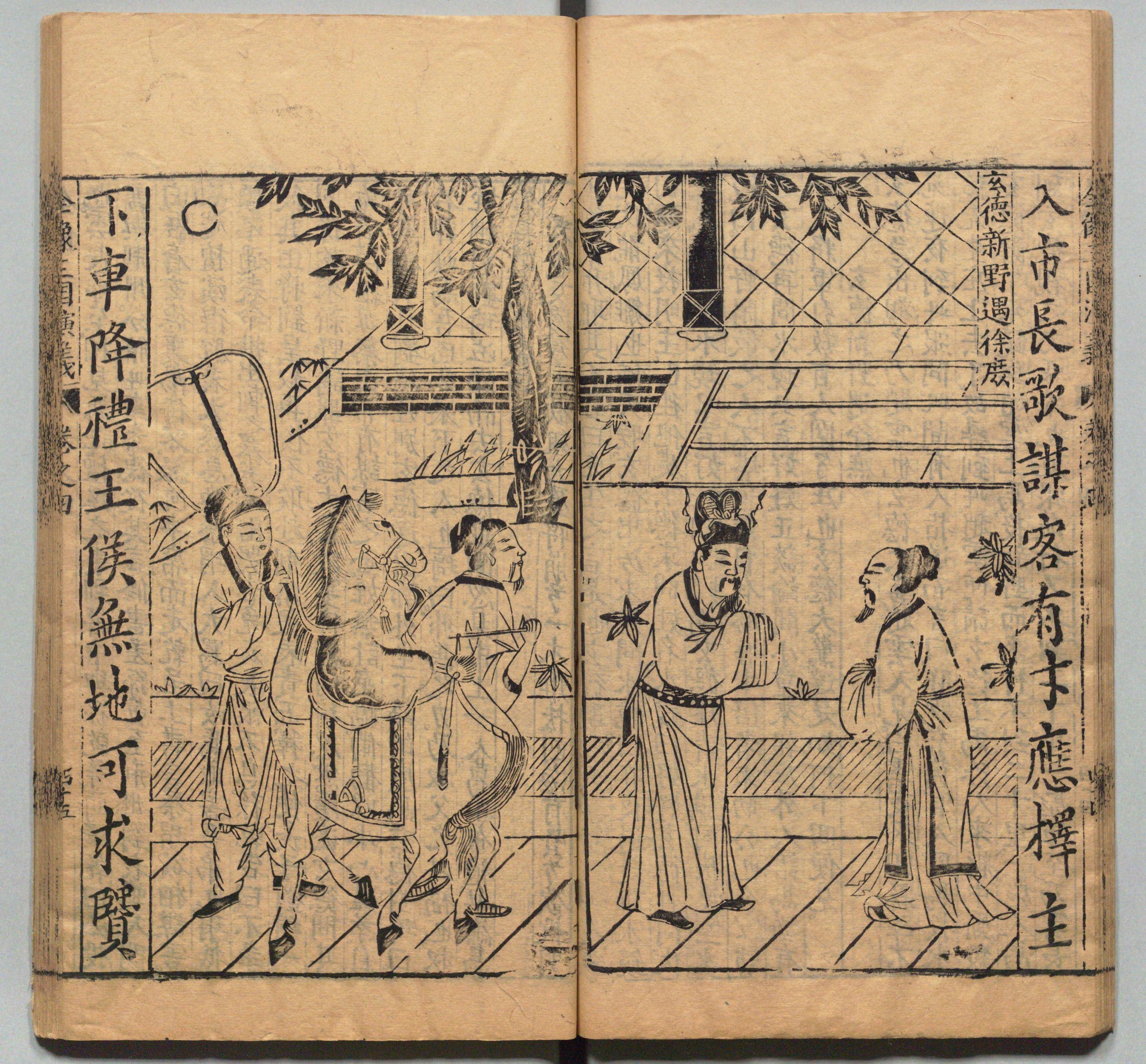 新刊校正古本大字音释三国志通俗演义 明万历十九年书林周曰校刊本